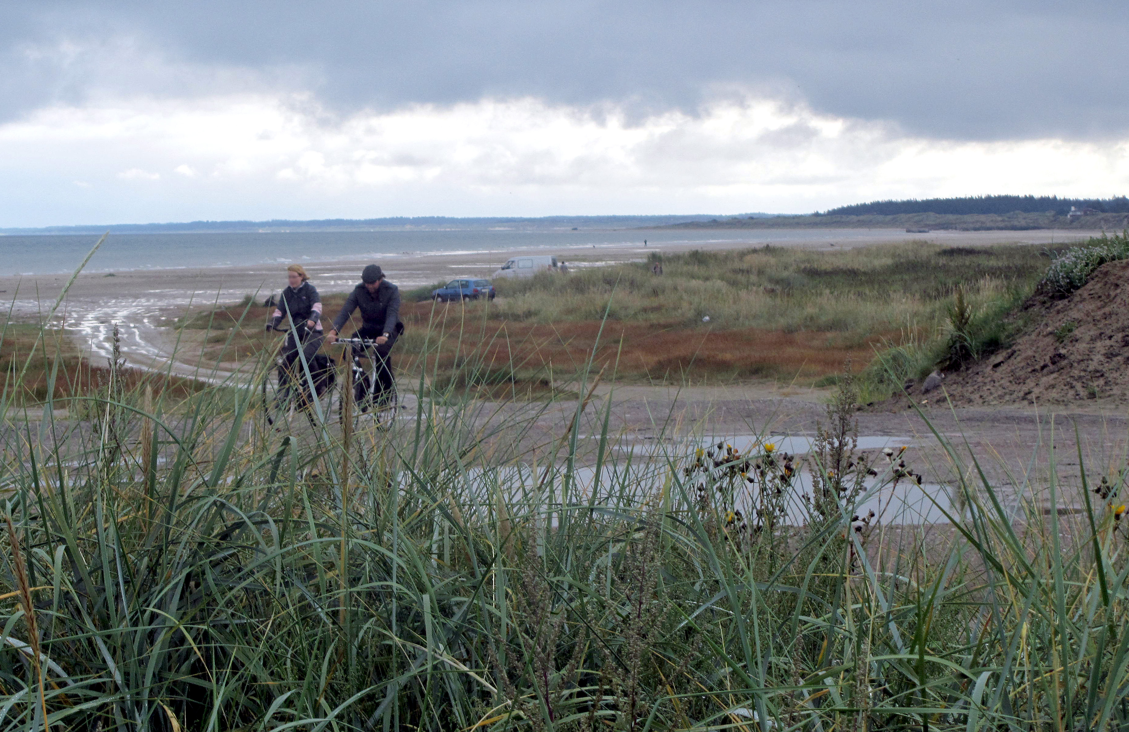 Tannis Bugt det fra Hirtshals, Denmark.